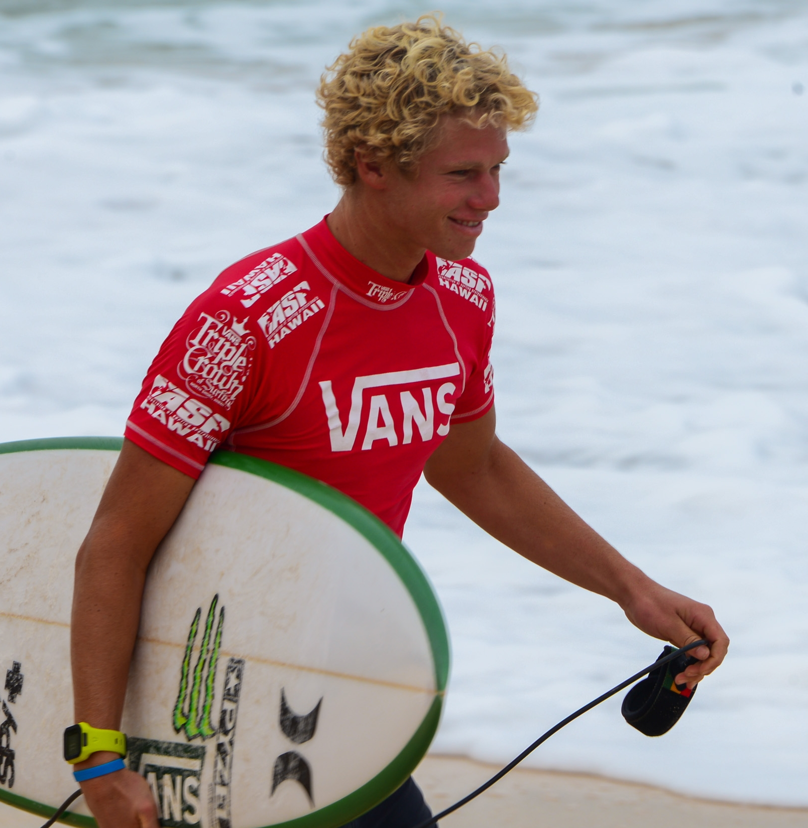 John John Florence durant la Triple couronne de surf 2013 à Banzai Pipeline, sur le North Shore d'Oahu (Hawaï)